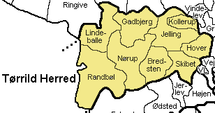 Tørrild Herred, Vejle Amt, Denmark Map by Svend-Erik Christiansen , edited by Nico-dk.